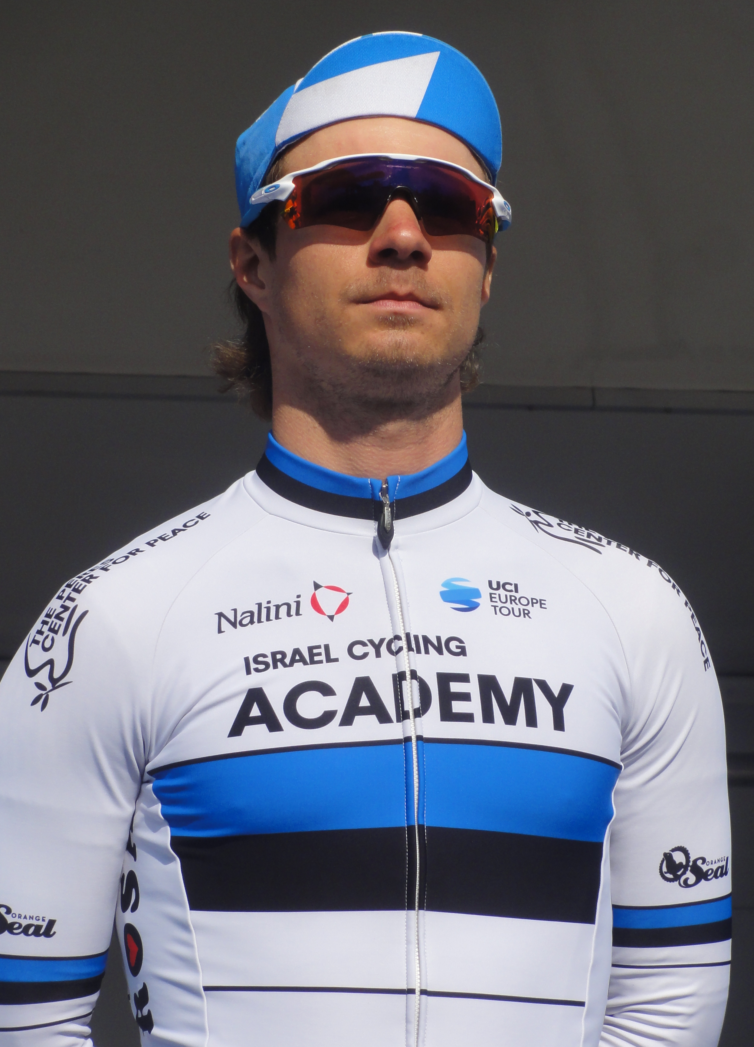 Reportage réalisé le dimanche 24 mars à l'occasion du départ et de l'arrivée du Grand Prix de Denain 2019 à Denain, Nord, Nord-Pas-de-Calais-Picardie, France.